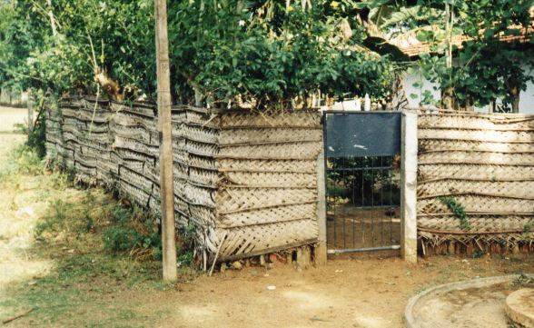 Photo shot by the user who uploaded it.